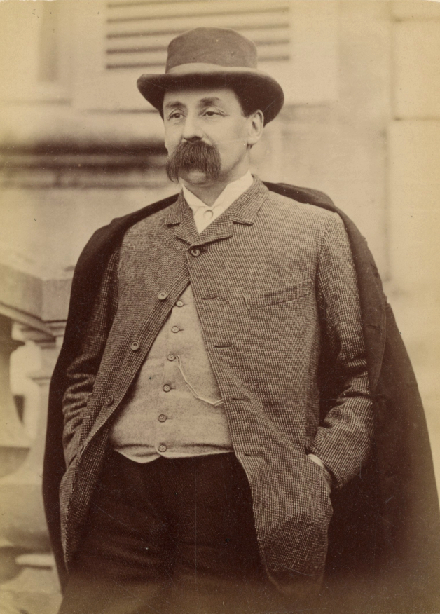 Gustave-Léon Schlumberger, Biographies alsaciennes avec portraits en photographie, série 4